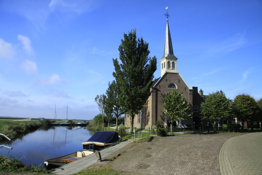 Prachtig in het landschap staat het kerkje van Elahuzen te pronken.